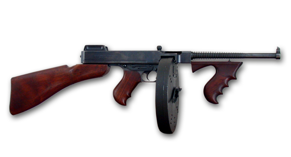 Thompson Campbell Maschinenpistole von 1921 mit 100 Schuß Trommelmagazin